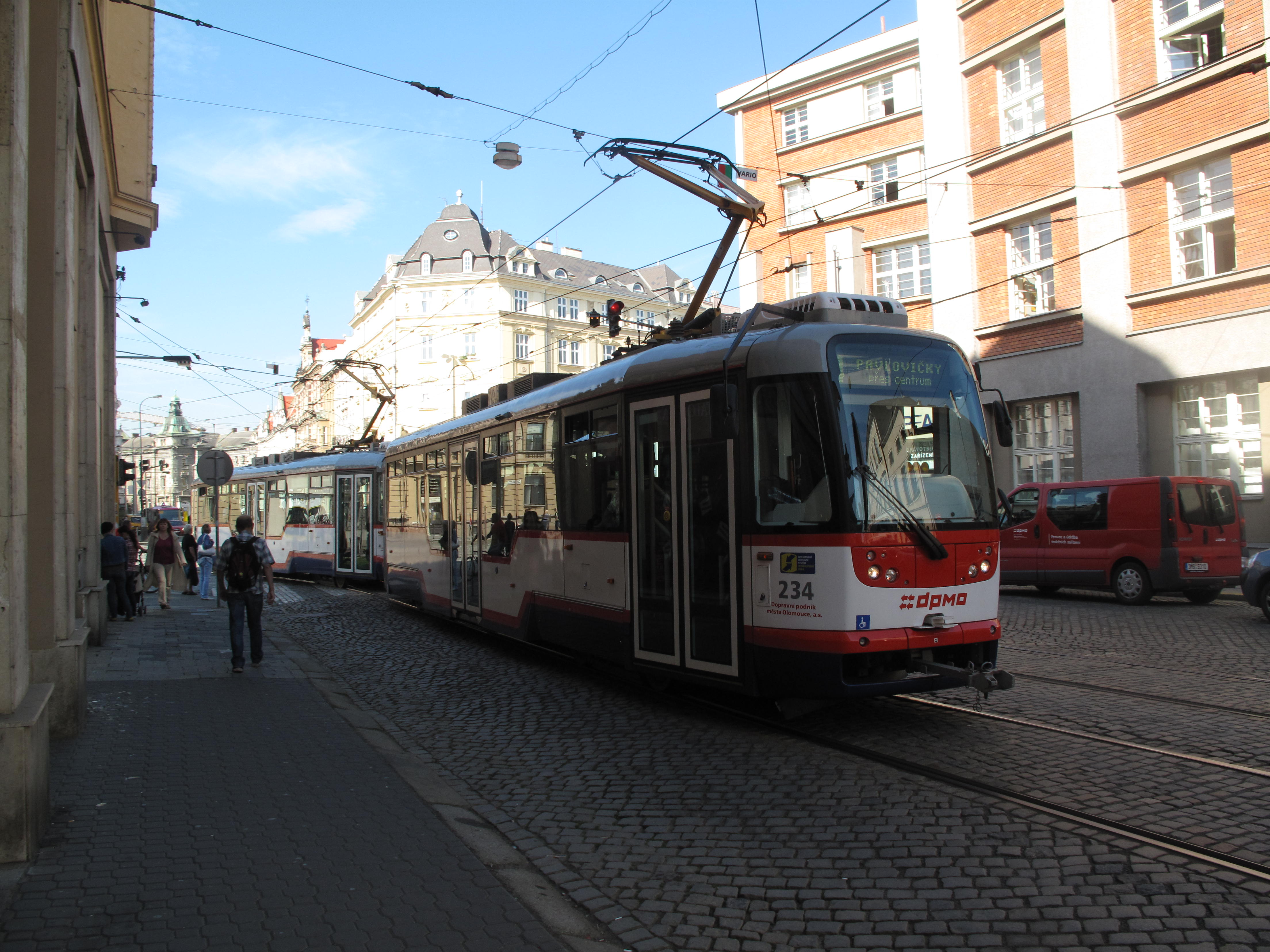 Česky: Olomouc